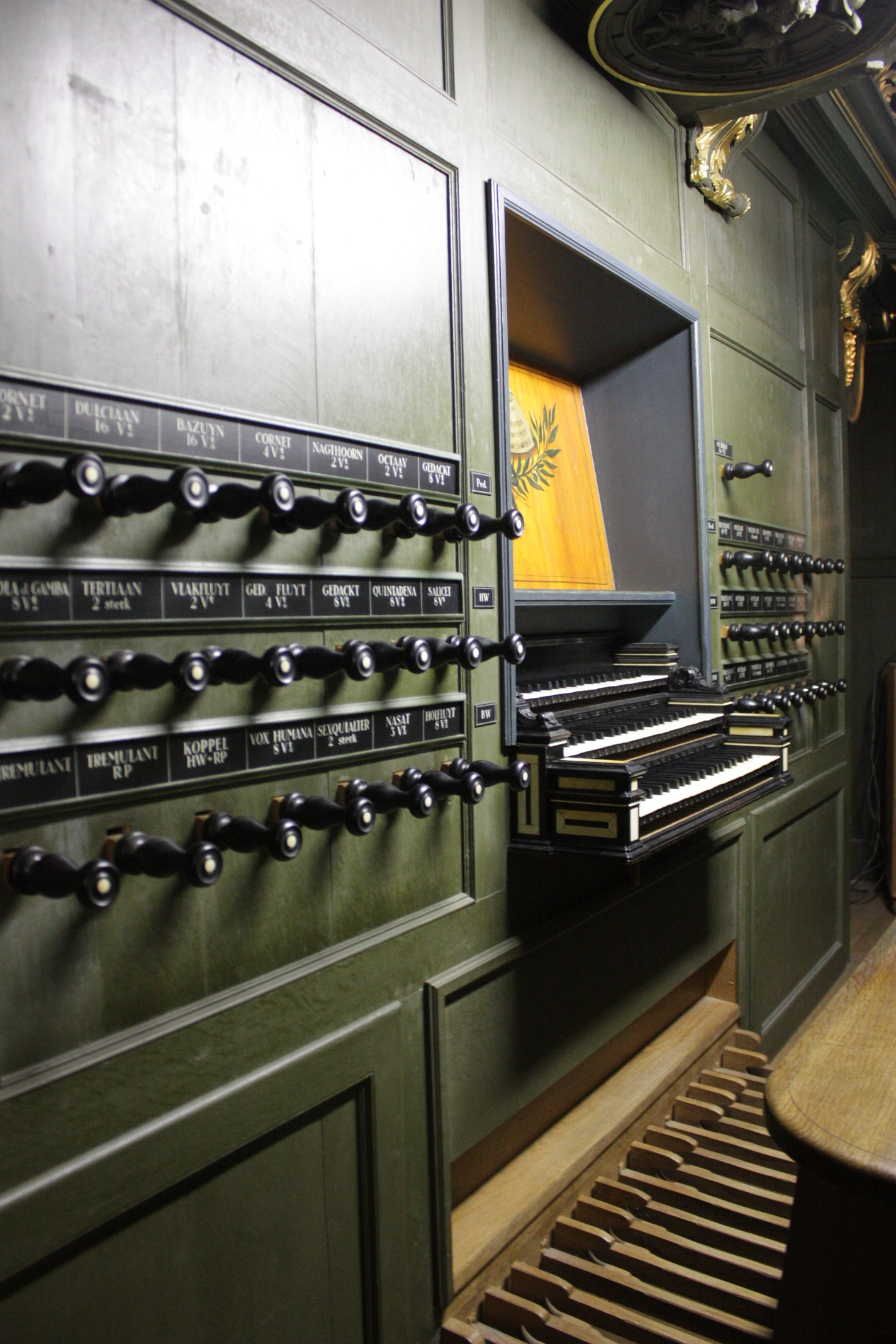 Schnitger organ Groningen Martinikerk